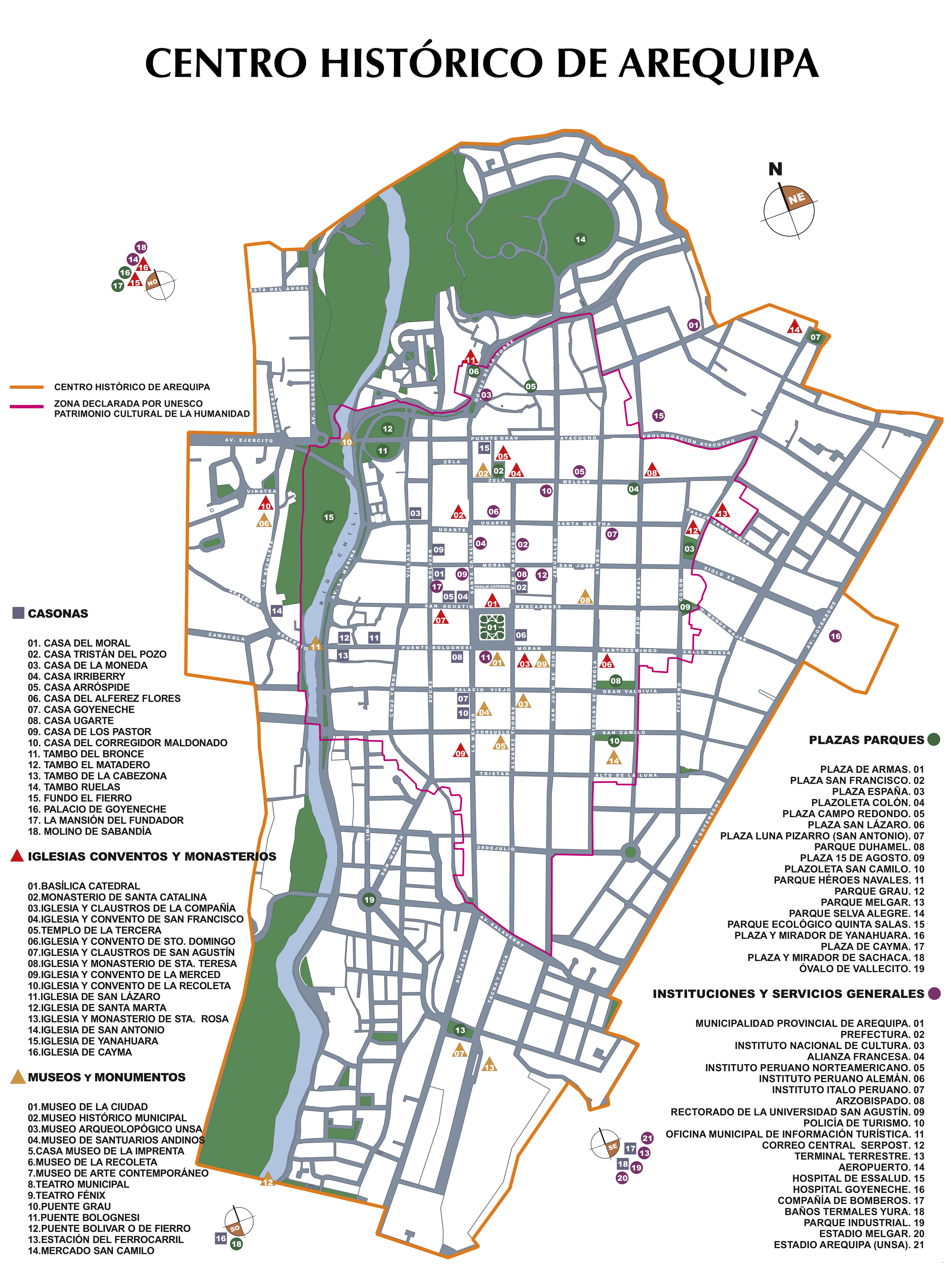 Centro histórico de la ciudad de Arequipa